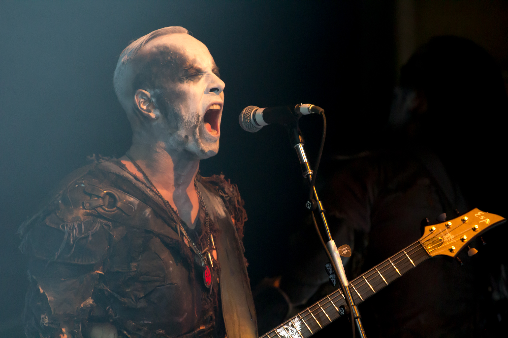 Behemoths Sänger Nergal auf der Barge to Hell, Dezember 2012.